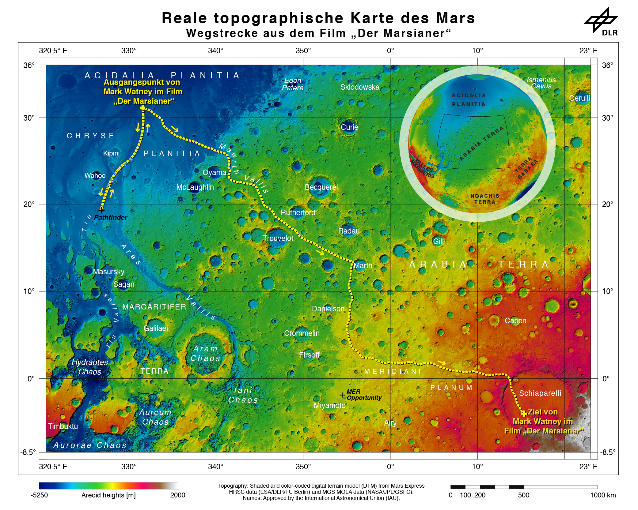 Im Rahmen des HRSC-Experiments auf der ESA-Mission Mars Express haben Wissenschaftler des DLR-Instituts für Planetenforschung die Übergangszone zwischen dem Äquator und dem nördlichen Wendekreis topographisch kartiert. Auf der Karte, die das Kartenblatt MC11 Ost enthält, wurde die Route eingezeichnet, die der "Marsianer" Mark Watney auf dem Mars zurücklegt. Bevor er sich von seinem Standpunkt in Chryse Planitia auf den Weg zur Ersatzrakete Ares 4 im Krater Schiaparelli aufmachen konnte, musste Watney allerdings erst ein intaktes Funkgerät organisieren, das er an der mehrere hundert Kilometer weiter südlich gelegenen Landestelle des ersten Marsrovers Soujourner der 1997 gelandeten Marsmission Pathfinder abmontieren konnte. Anschließend führte ihn sein Weg zur Mündung des Mawrth-Tals, das er talaufwärts entlangfuhr und dadurch etwa 2000 Meter an Höhe gewann. Anschließend fuhr Watney weitere 2500 Meter bergan durch das zerklüftete und von Kratern übersäte Meridiani Planum bis an den Rand des 450 Kilometer großen Kraters Schiaparelli, an dessen nordwestlichem Rand ein Bergrutsch die natürliche Rampe bildete, über die Watney in den fast 700 Meter tiefer gelegenen Krater zur Ares 4-Rakete gelangte. Mehr dazu: #RettetMarkWatney Video aus Bildern der Raumsonde Mars Express, das den Weg Mark Watneys zeigt: 2D-Video: Download der FullHD-Datei: 3D-Video auf YouTube